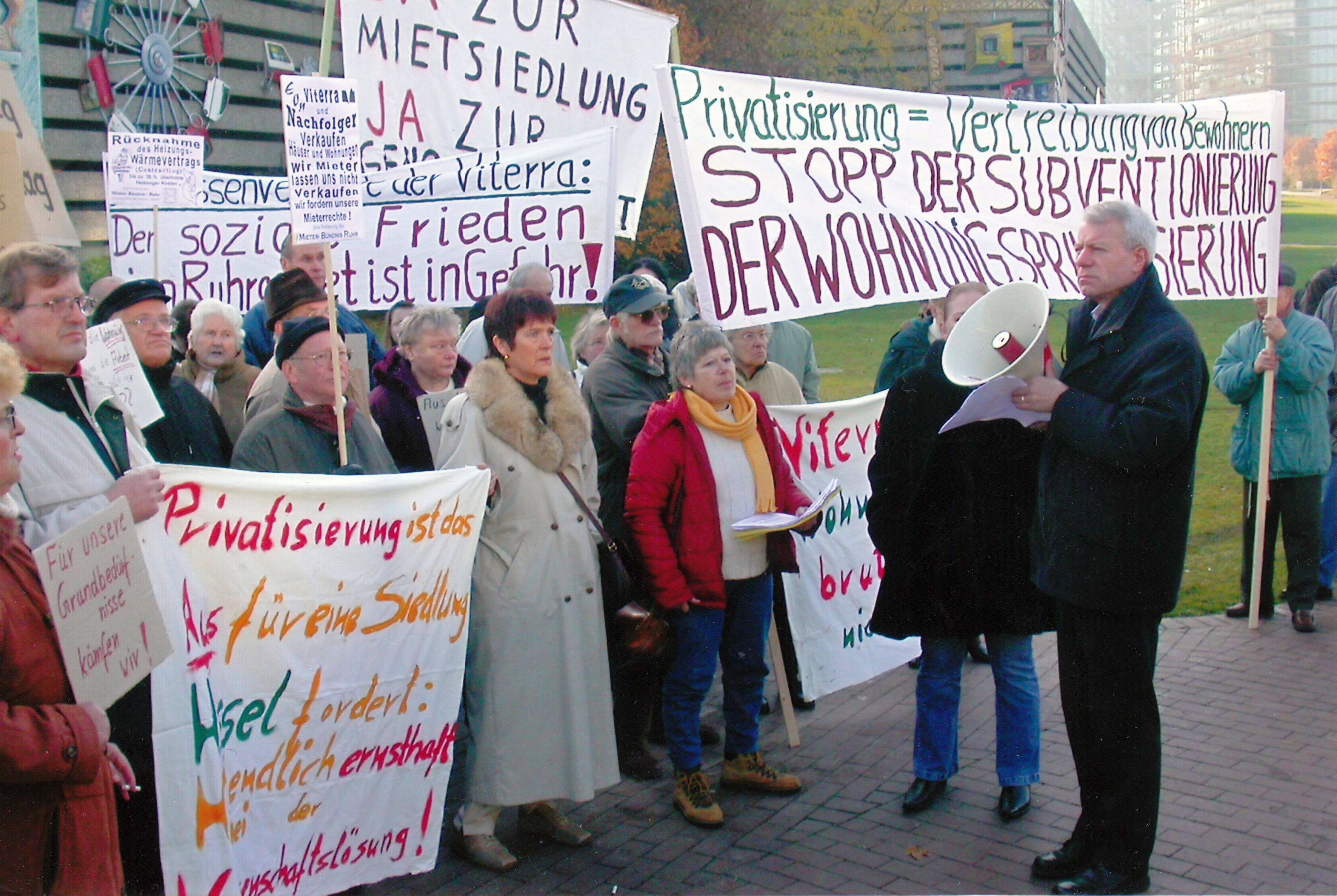 Mieterdemonstration gegen Verkauf der Viterra AG vor dem Landtag NRW am 24.11.2004